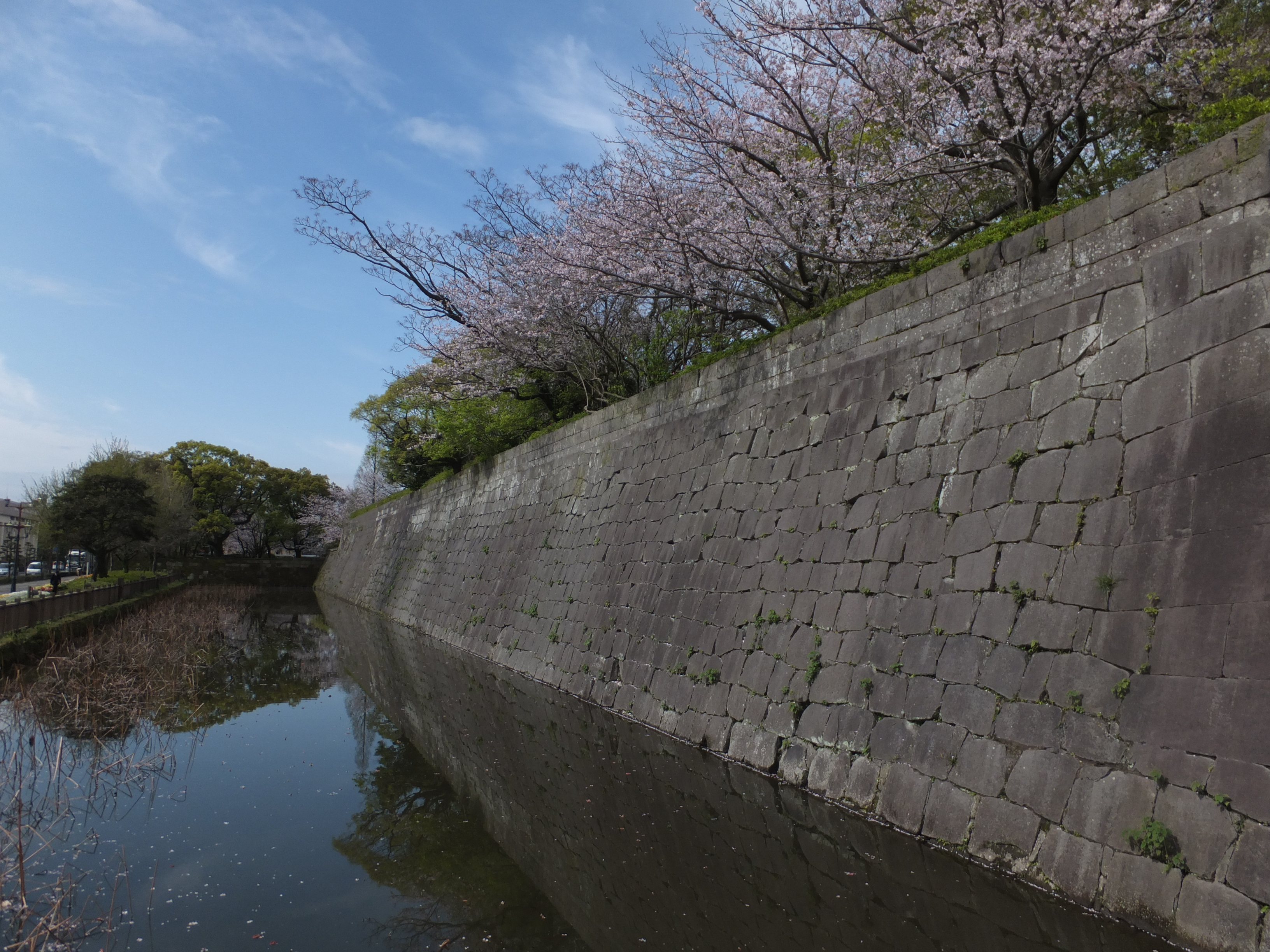 鹿児島城の石垣